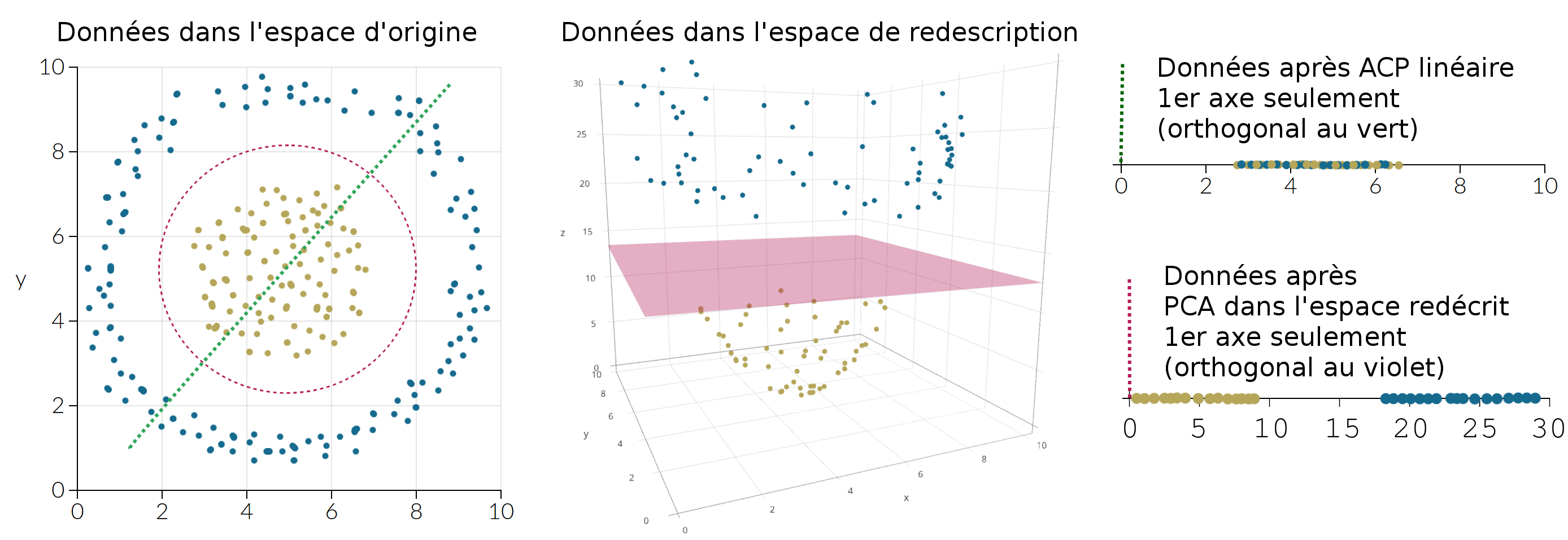 Données non séparables linéairement à gauche. Changement de dimension de l'espace d'entrée par une combinaison non linéaire des axes: R 2 ⇒ R 3 {\displaystyle \mathbb {R} ^{2}\Rightarrow \mathbb {R} ^{3 tel que ( x , y ) ⇒ ( x , y , z ) {\displaystyle (x,y)\Rightarrow (x,y,z)} avec z = x 2 + y 2 {\displaystyle z=x^{2}+y^{2 . Les kernels remplacent ce type de combinaison triviale et fournissent directement le résultat du produit scalaire. Résultats de l'ACP sur le premier axe orthogonal à l'hyperplan (violet ou vert). On observe une amélioration des résultats avec la changement de dimensions (augmentation de la variance sur le premier axe). Note: une analyse en coordonnées polaire aurait rendu le problème linéaire.